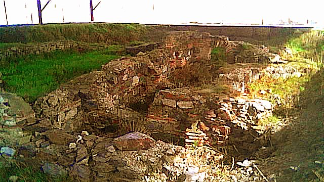 Etwas entfernt zum Haupttor der Garnison Dinogetia entstand im ausgehenden 3. Jahrhundert oder etwas später am leicht abfallenden Hang ein Kastellbad, das noch bis zum Ende der frühbyzantinischen Zeit in Betrieb blieb. Kastellbäder wurden möglicherweise auch von den örtlichen Vicusbewohnern mitverwendet.